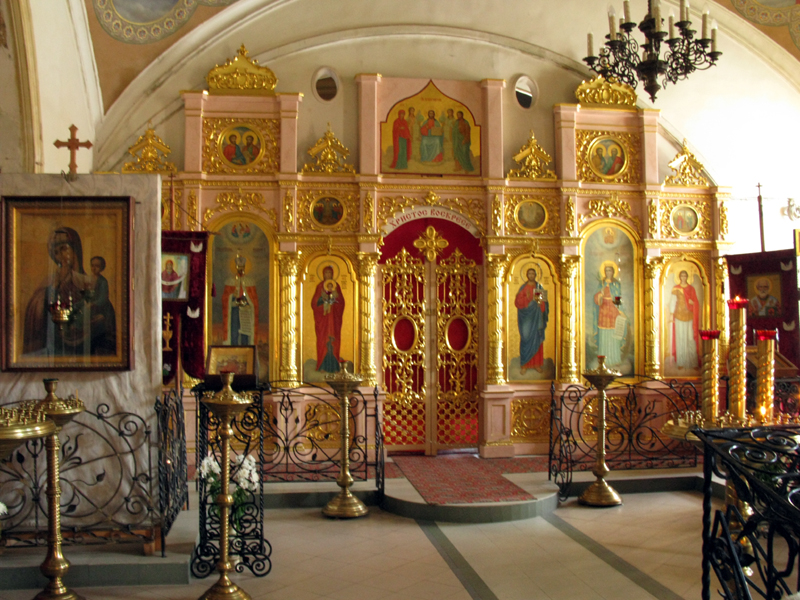 Храм Ирины Мученицы в Покровском